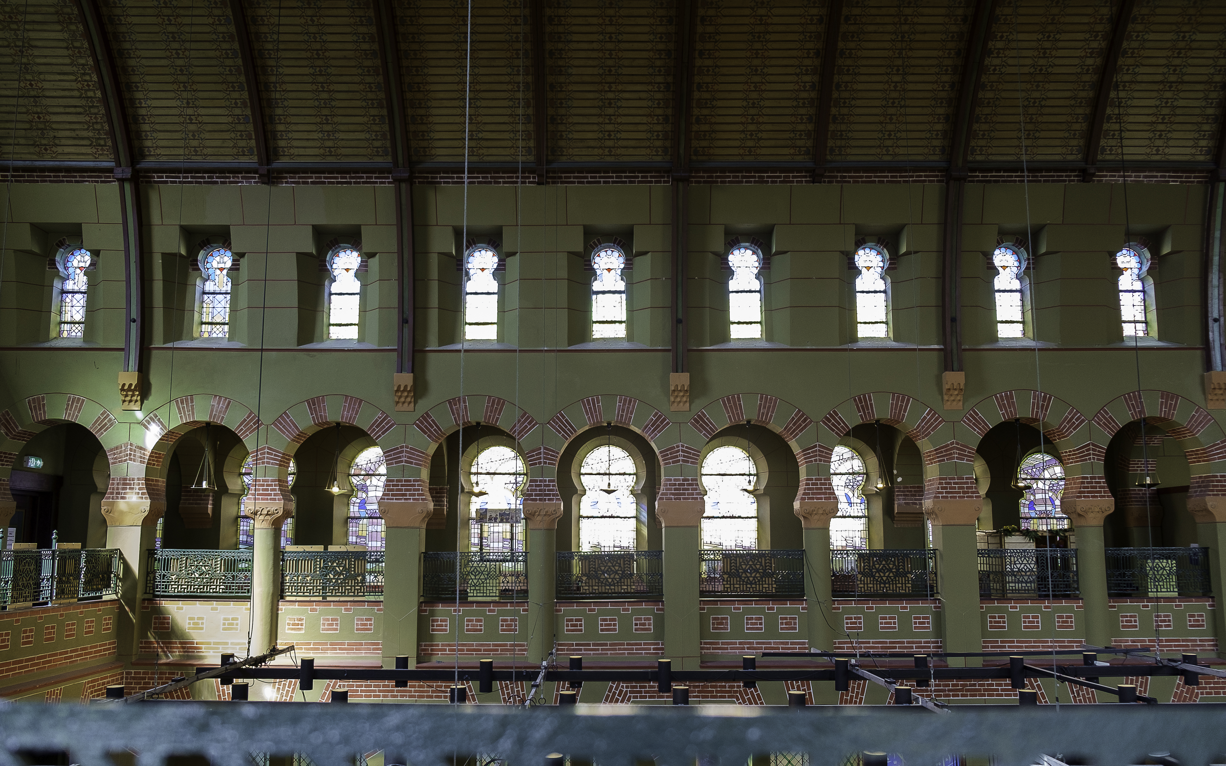 hoefijzerbogen in de synagoge van Groningen